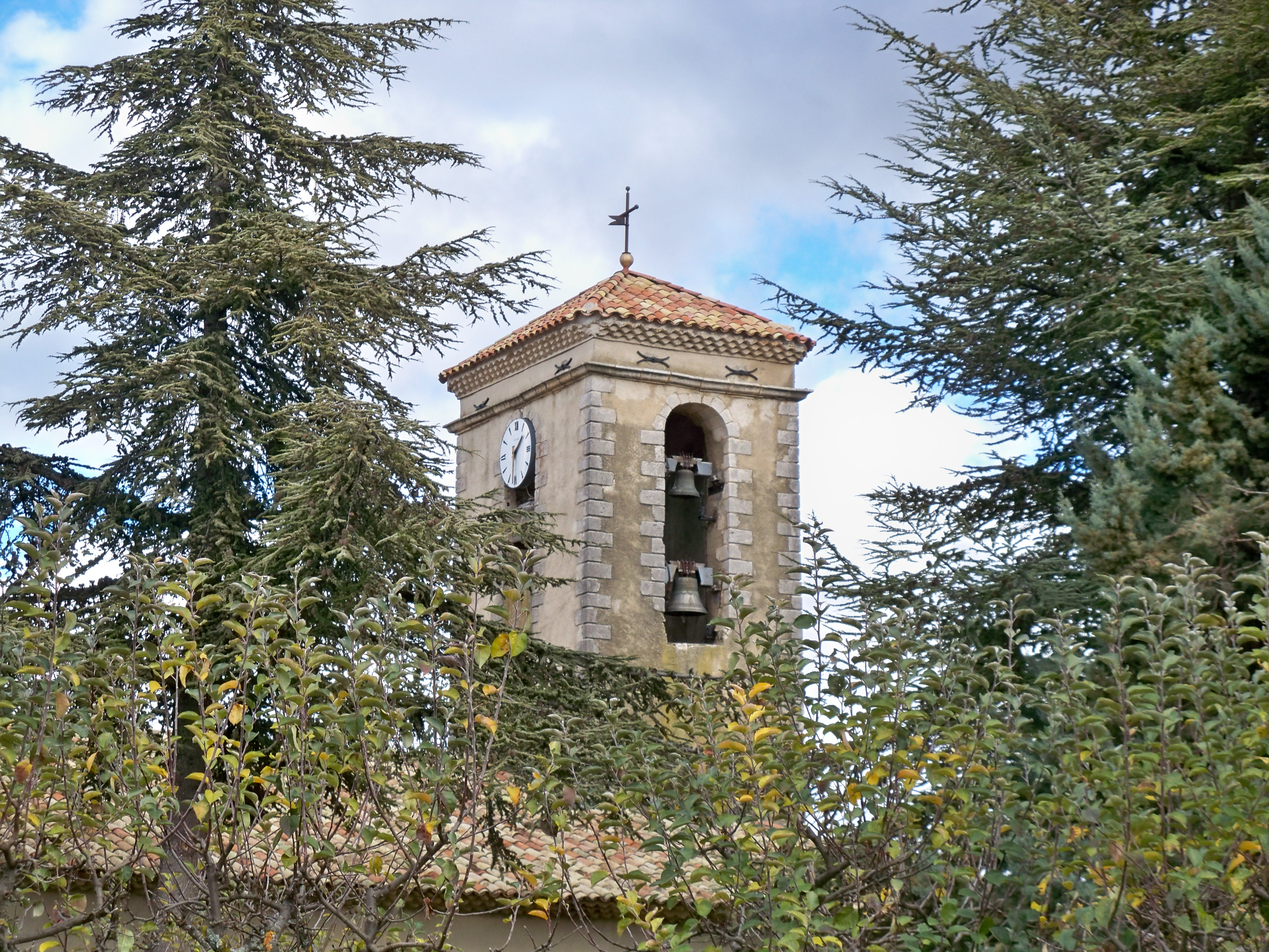 clocher de l'église de Revest du Bion (04)